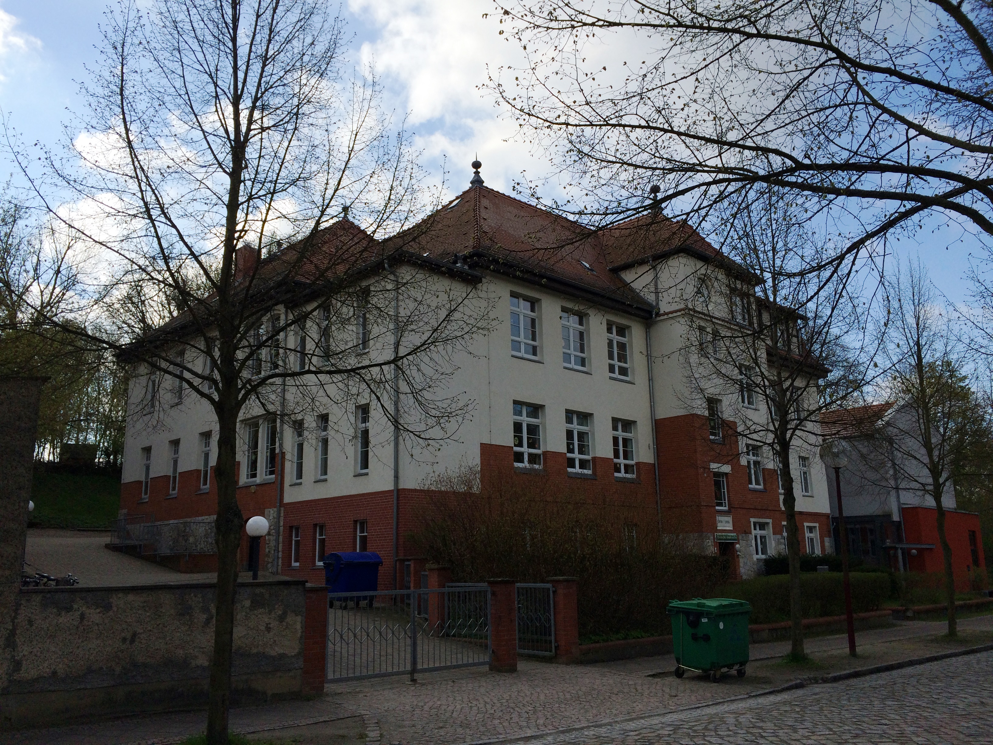 Denkmalgeschützte Baugruppe bestehend aus Post, Beamtenwohnhaus, Arztvilla, Schule und Hotel in der Lindenstraße 1 bis 5 in Teupitz